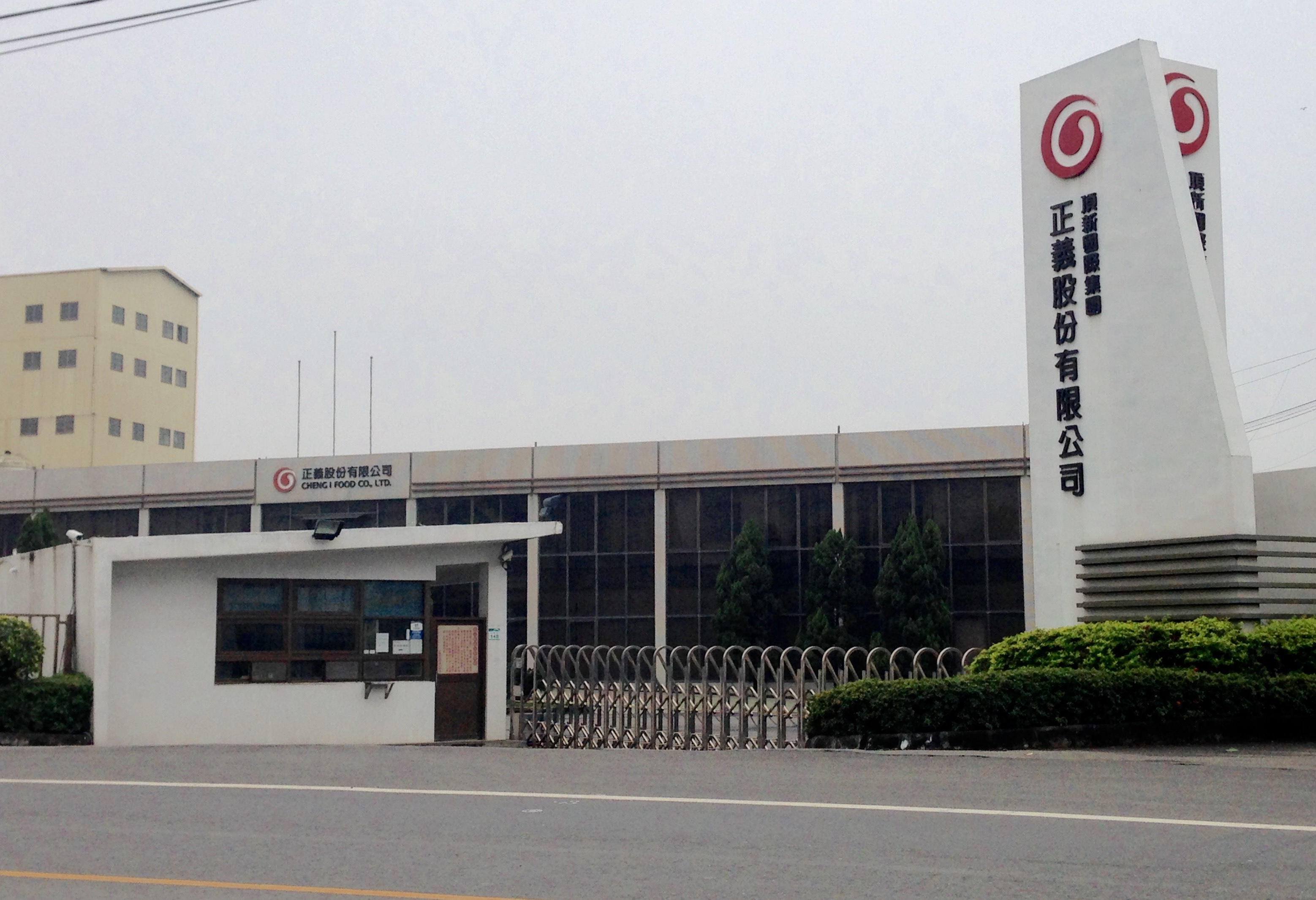 中文（台灣）: 正義股份有限公司，位於高雄市仁武區仁林路148號。